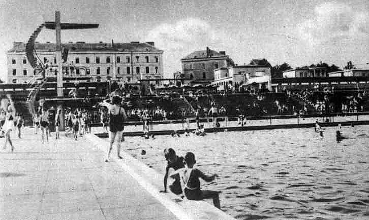 Kąpielisko Panorama w Bielsku-Białej. Fotografia z 1936 r.